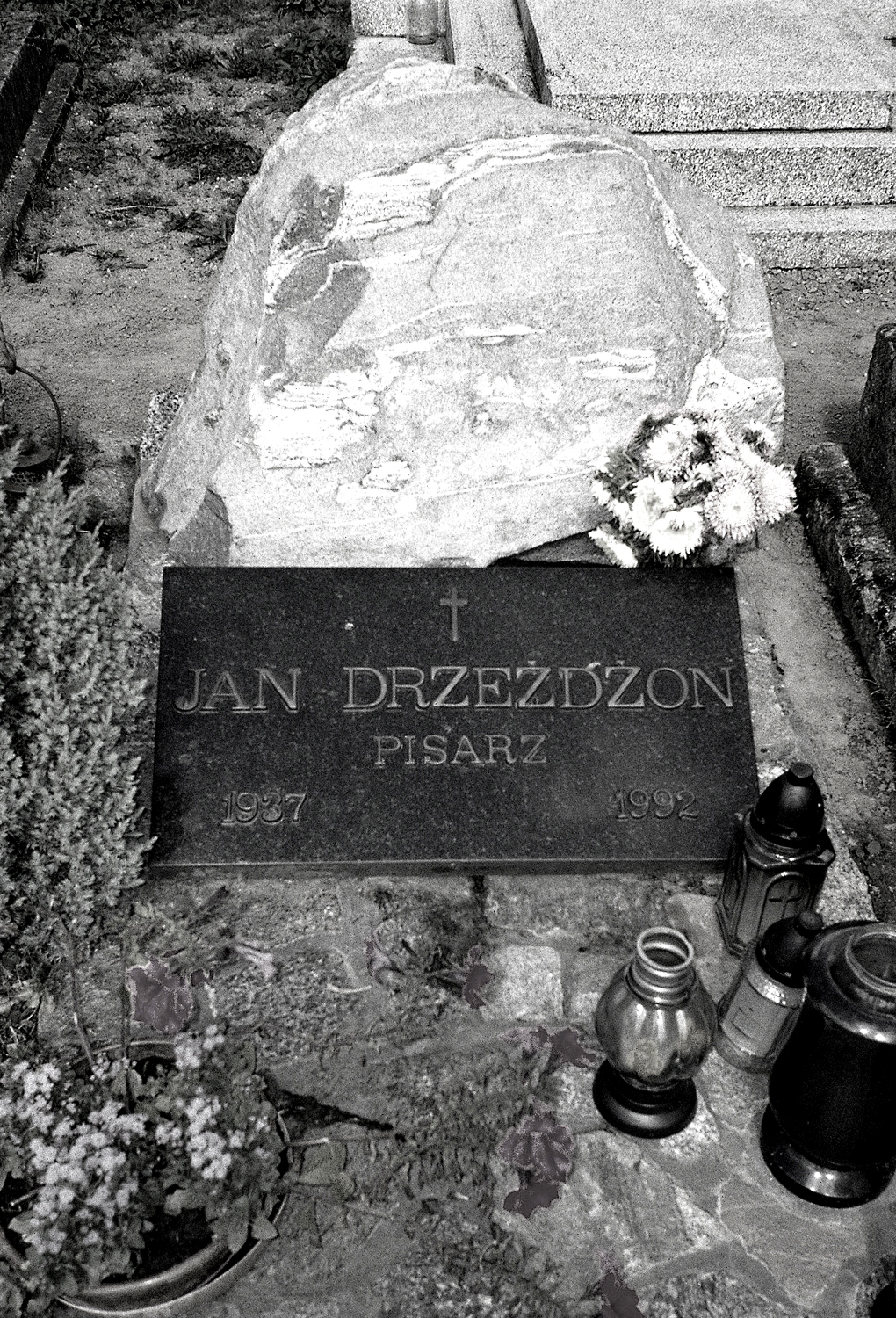 Grób Kaszuby Jana Drzeżdżona (pisarza) na cmentarzu we wsi Mechowo, koło Wejherowa